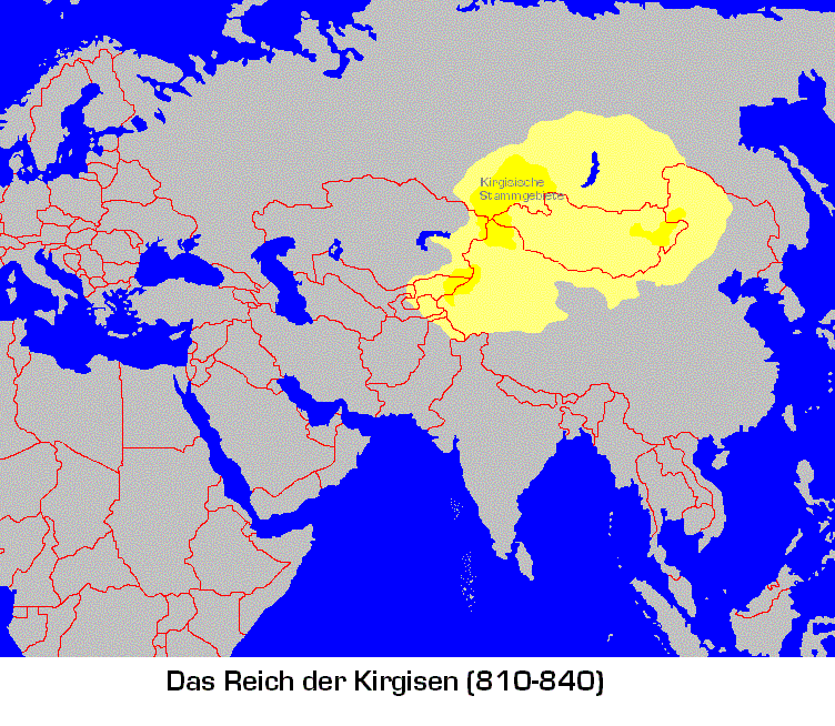 Das Reich der Kirgisen (810-840); selbst erstellt am 4. Aug. 2004, Public Domain Diese Darstellungskarte zeigt den größten Umfang des Kirgisenreiches nebst den Siedlungsgebieten (Kirgisische Stammgebiet) der damals als "Kirgis" bezeichneten Völker: Jenissej-Kirgisen Tien-schan-Kirgisen Kerulen-Kirgisen